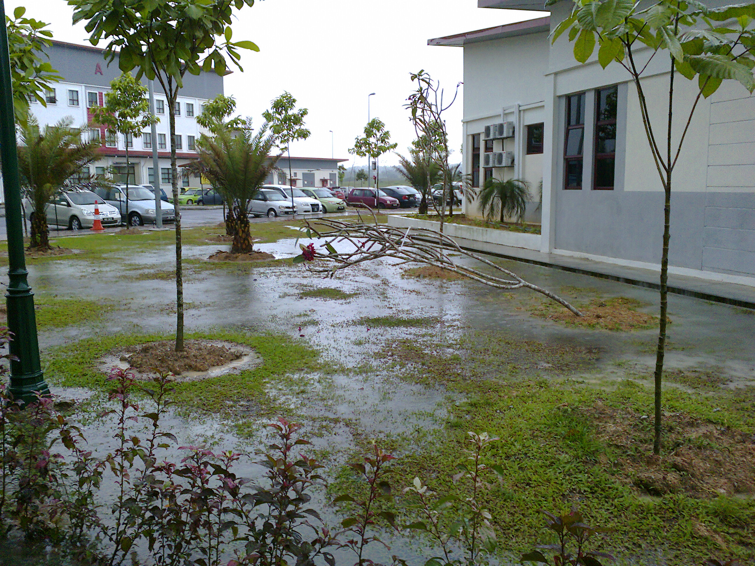 Situasi genang air (waterlogging) apabila hujan turun dengan lebat.